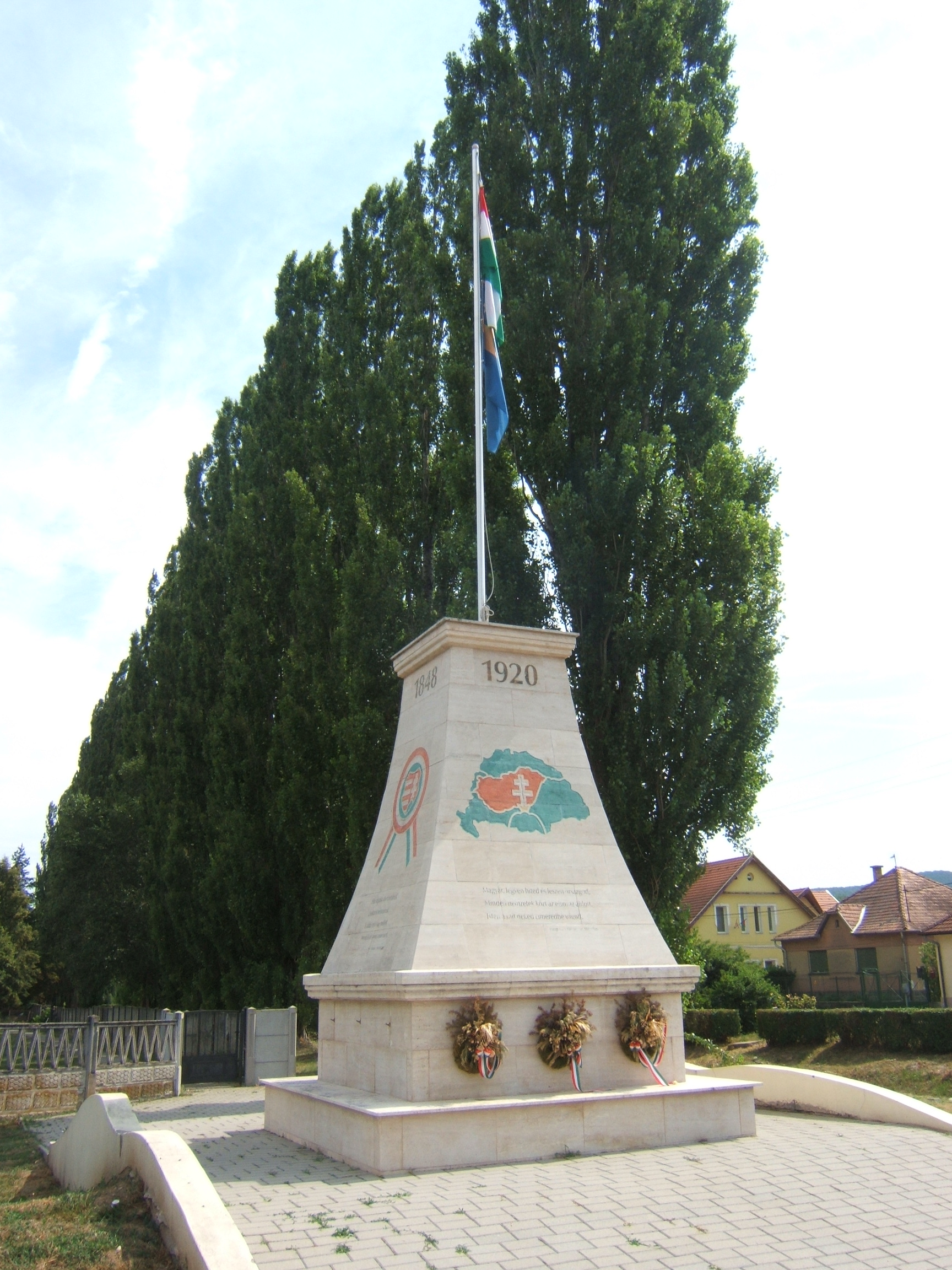 Pilismarót, történelmi emlékmű